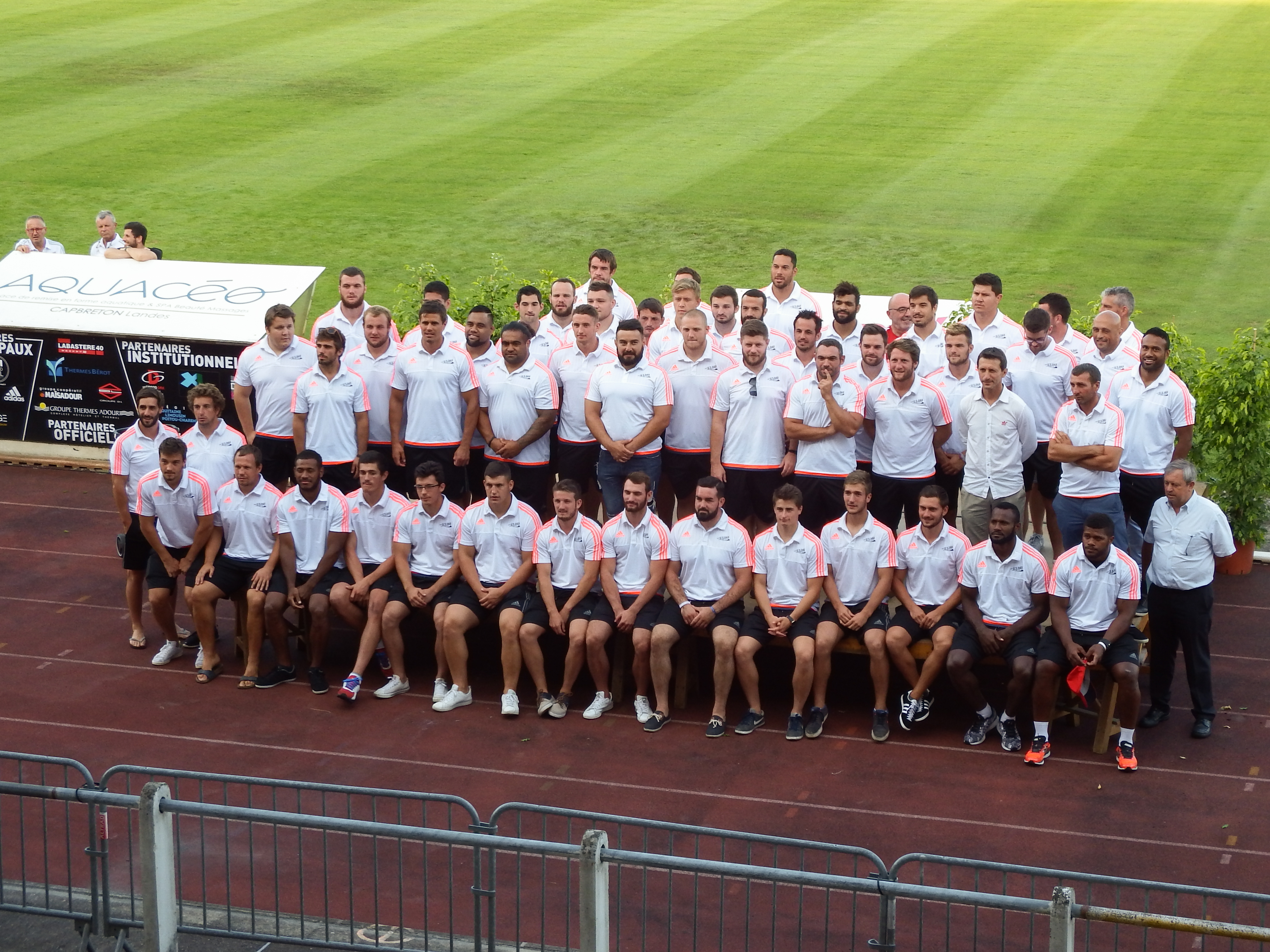 Présentation de l'équipe de l'US Dax pour la saison 2016-2017.